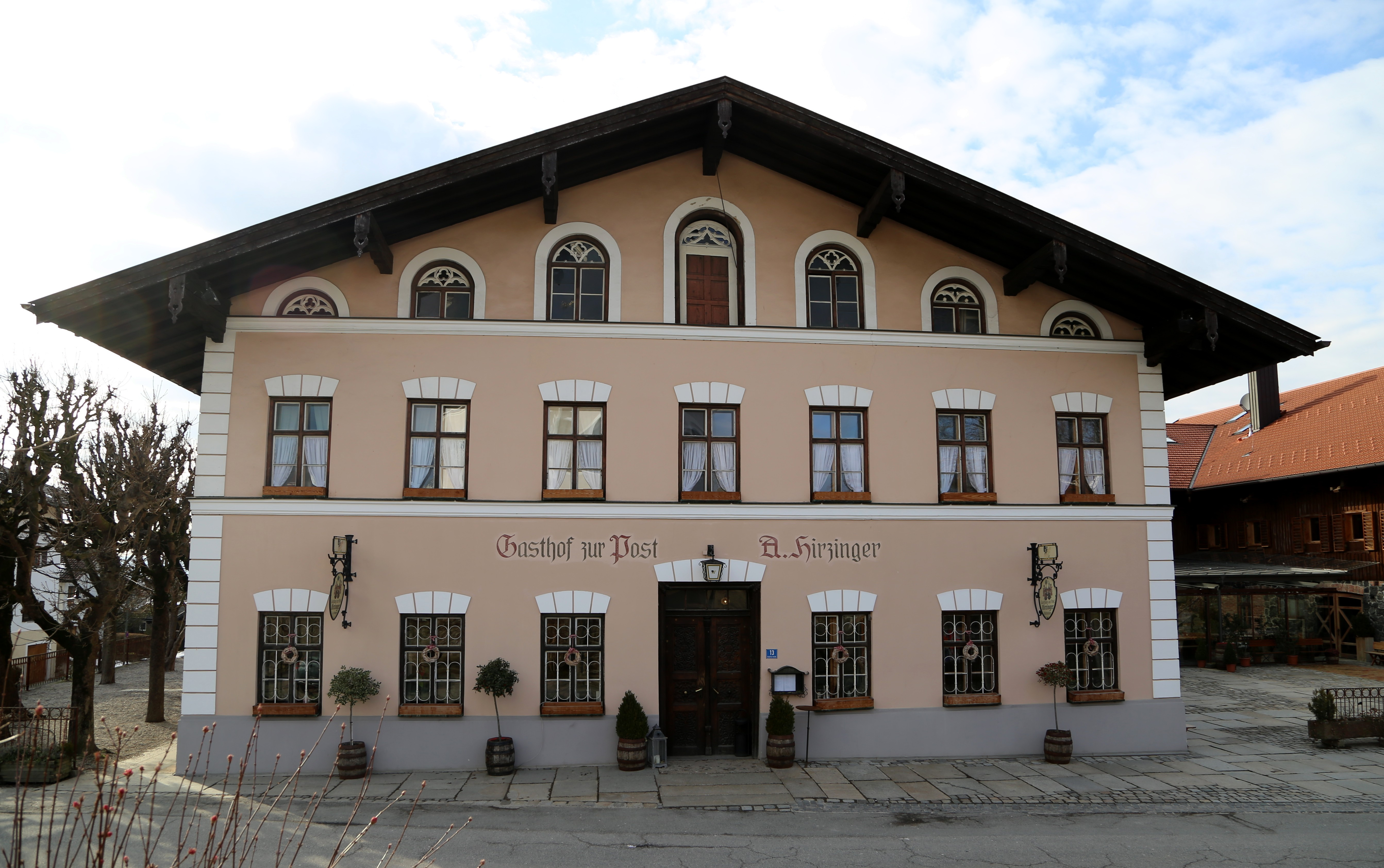 Endorfer Straße 13; Gasthaus, dreiflügelige Anlage mit Wohnbau und Nebengebäuden, zweigeschossiger Flachsatteldachbau mit Rundbogenfenstern im Giebel, spätklassizistische Putzgliederung und neugotische geschnitzte Tür, um 1870-80; mit Ausstattung.